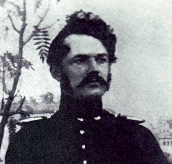 Werner Siemens als Seconde-Lieutenant der preußischen Artillerie. Nach einer Daguerrotypie um 1842.